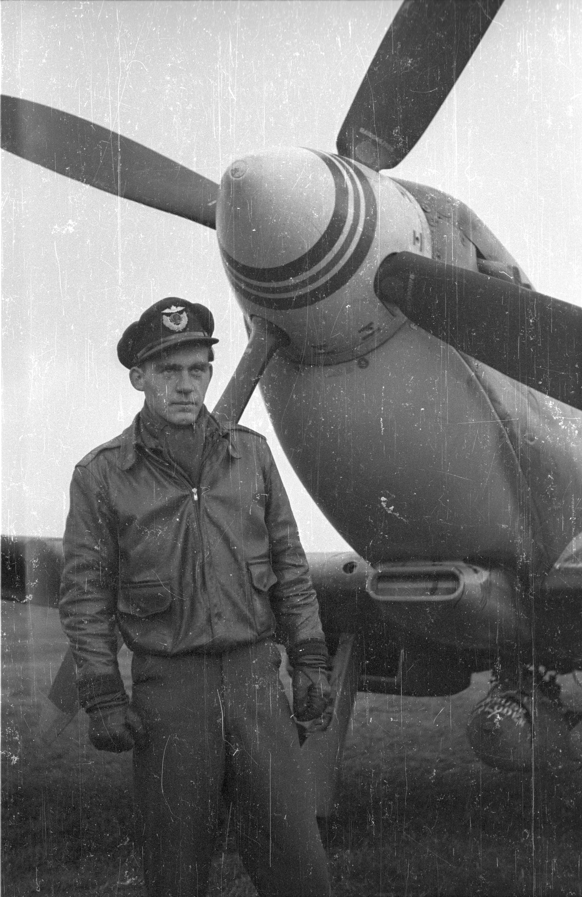 Bildet er hentet fra Arkivverket. Norske flyvere på kontinentet Arkivinstitusjon : Riksarkivet Arkivnavn : NTBs krigsarkiv Sted : UKJENT LAND, 00 Ukjent, 00 Ukjent, Emneord: Andre verdenskrig Avbildet